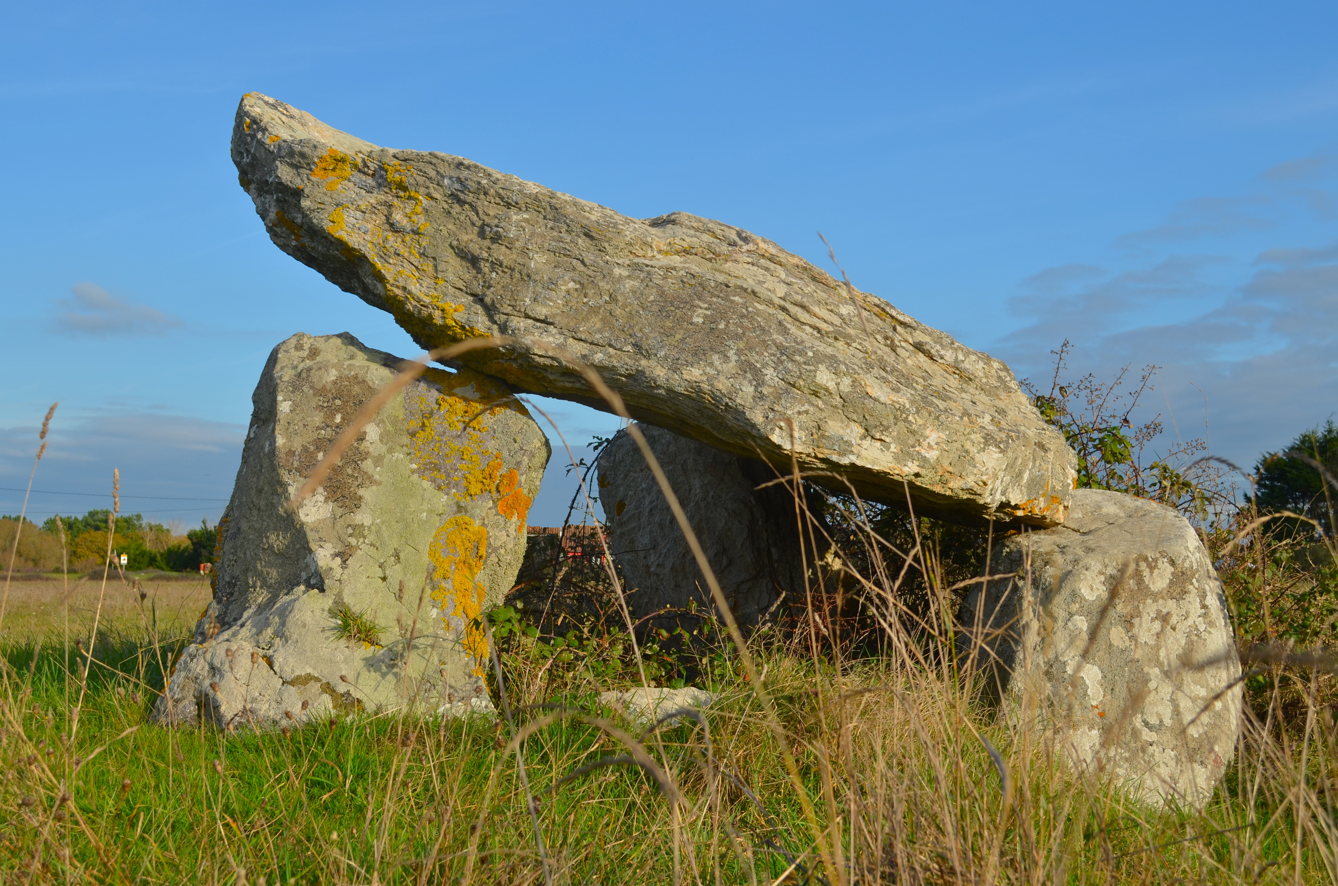 Dolmen de Pierre levée de Soubise - Brétignolles-sur-Mer (Vendée)